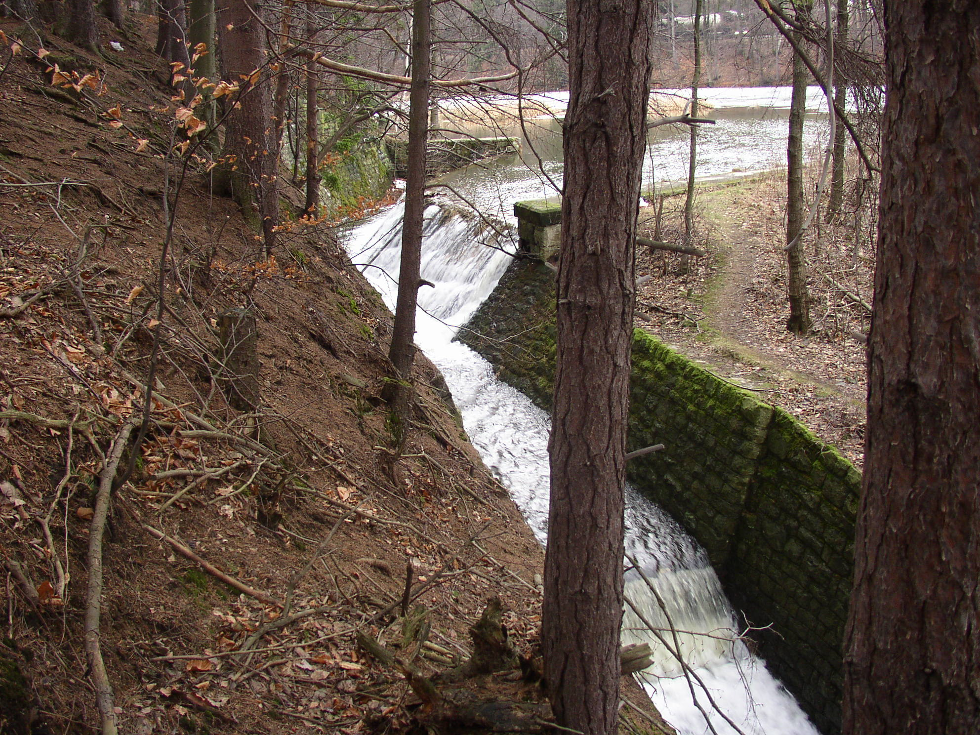 Přepad Lesenské přehrady a náhon pod ní, Dolní Podluží, okres Děčín, Ústecký kraj, Česká republika